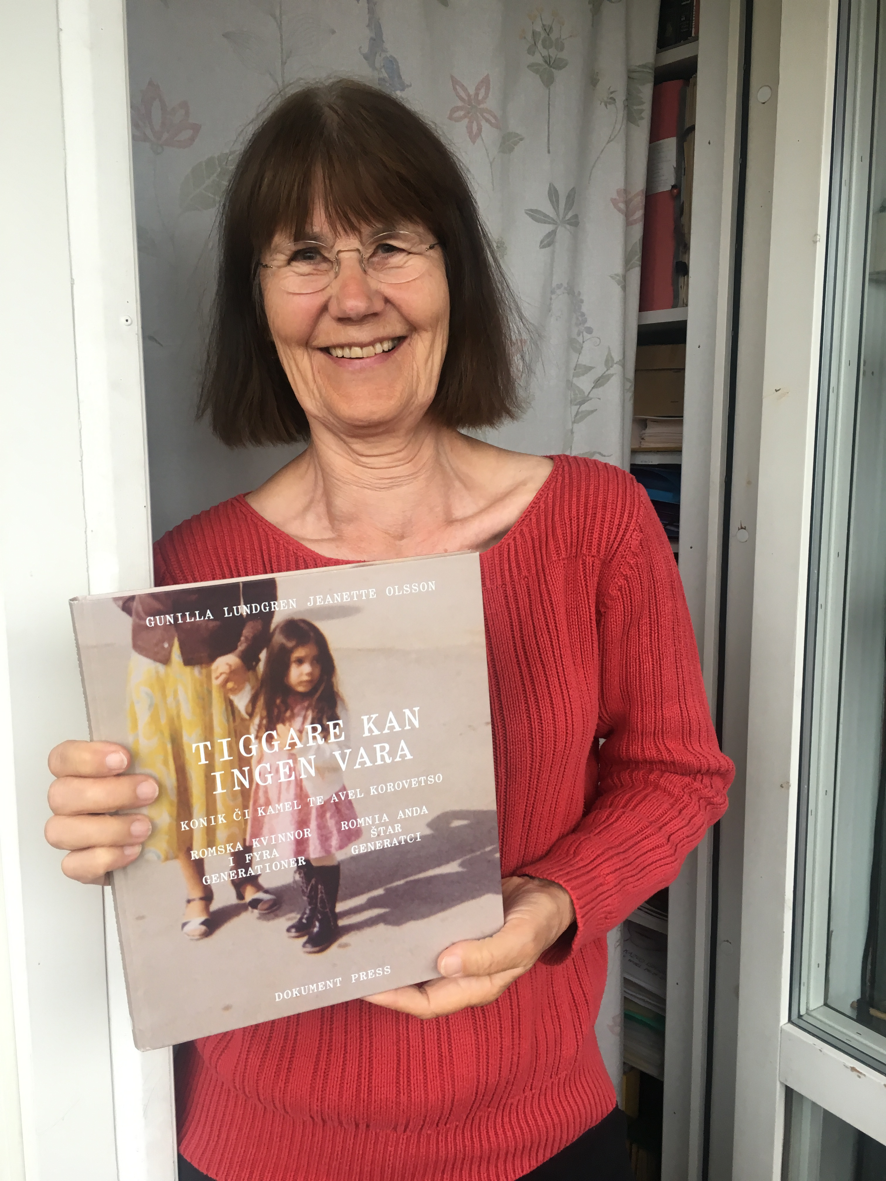 The writer Gunilla Lundgren with her latest book, in Stockholm 2019.